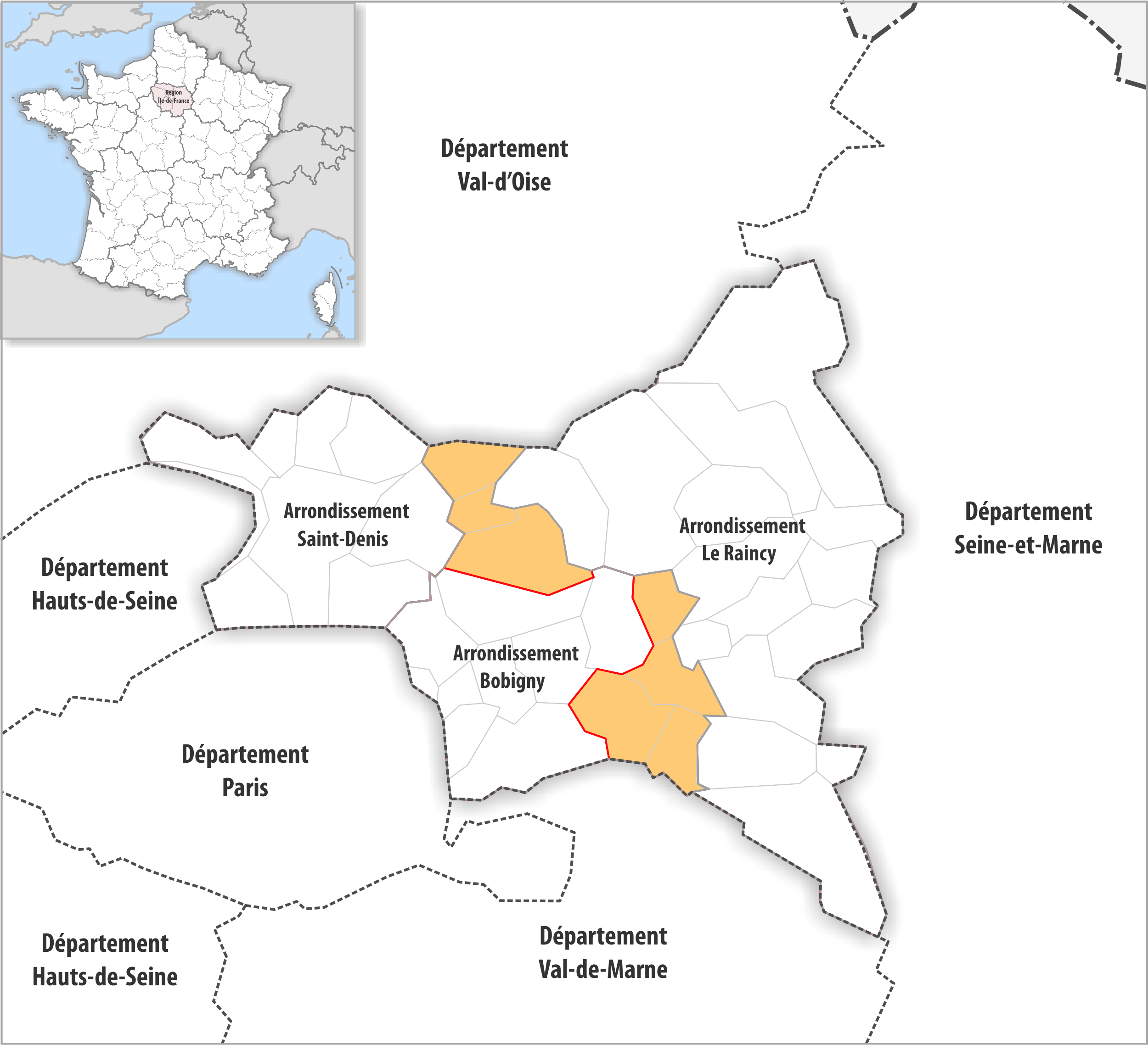 Arrondissements Anpassungen auf 2017 im Departement Seine-Saint-Denis